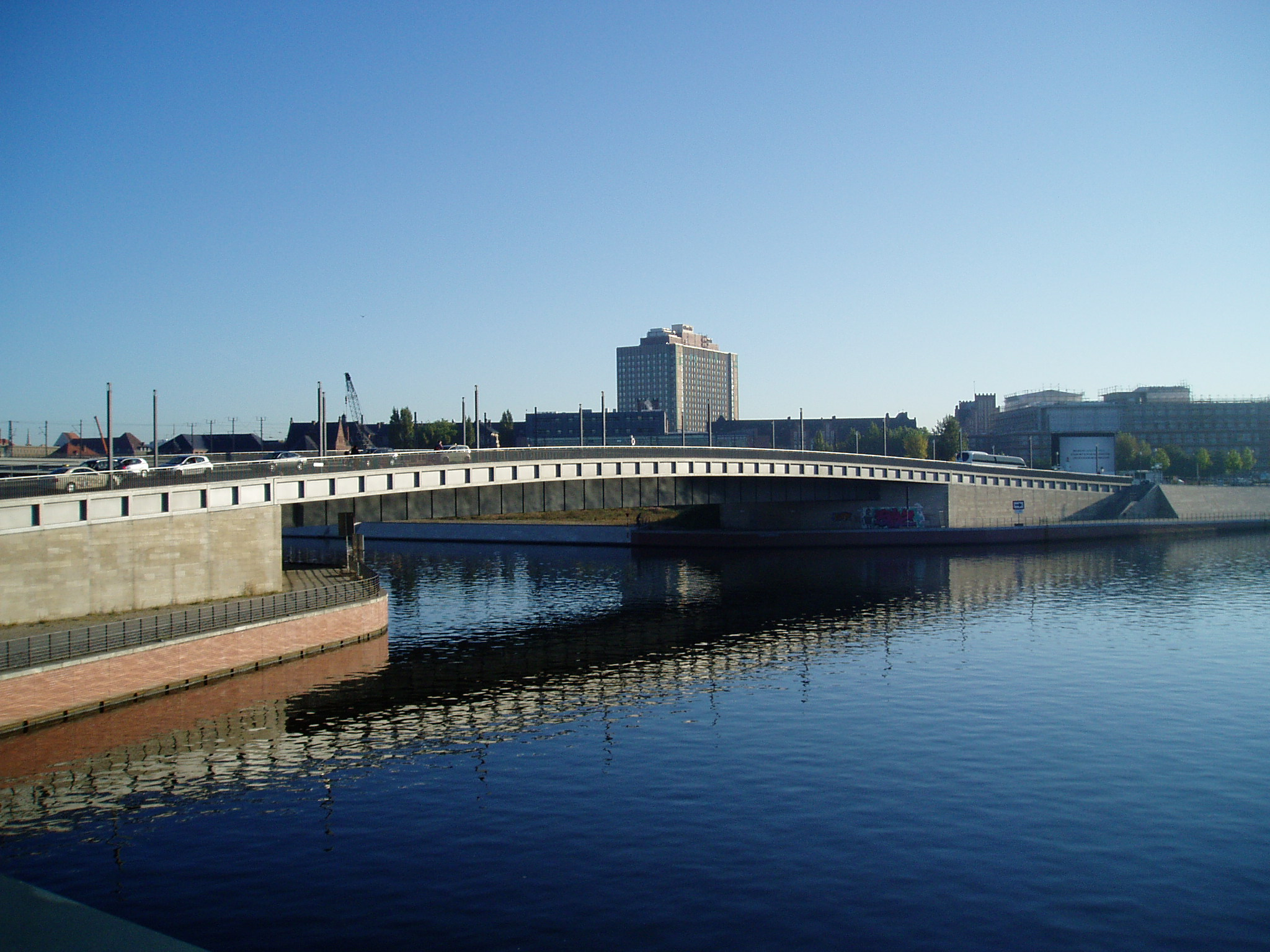 Berlin-Mitte, (Neue) Hugo-Preuß-Brücke; im Hintergrund die Charité